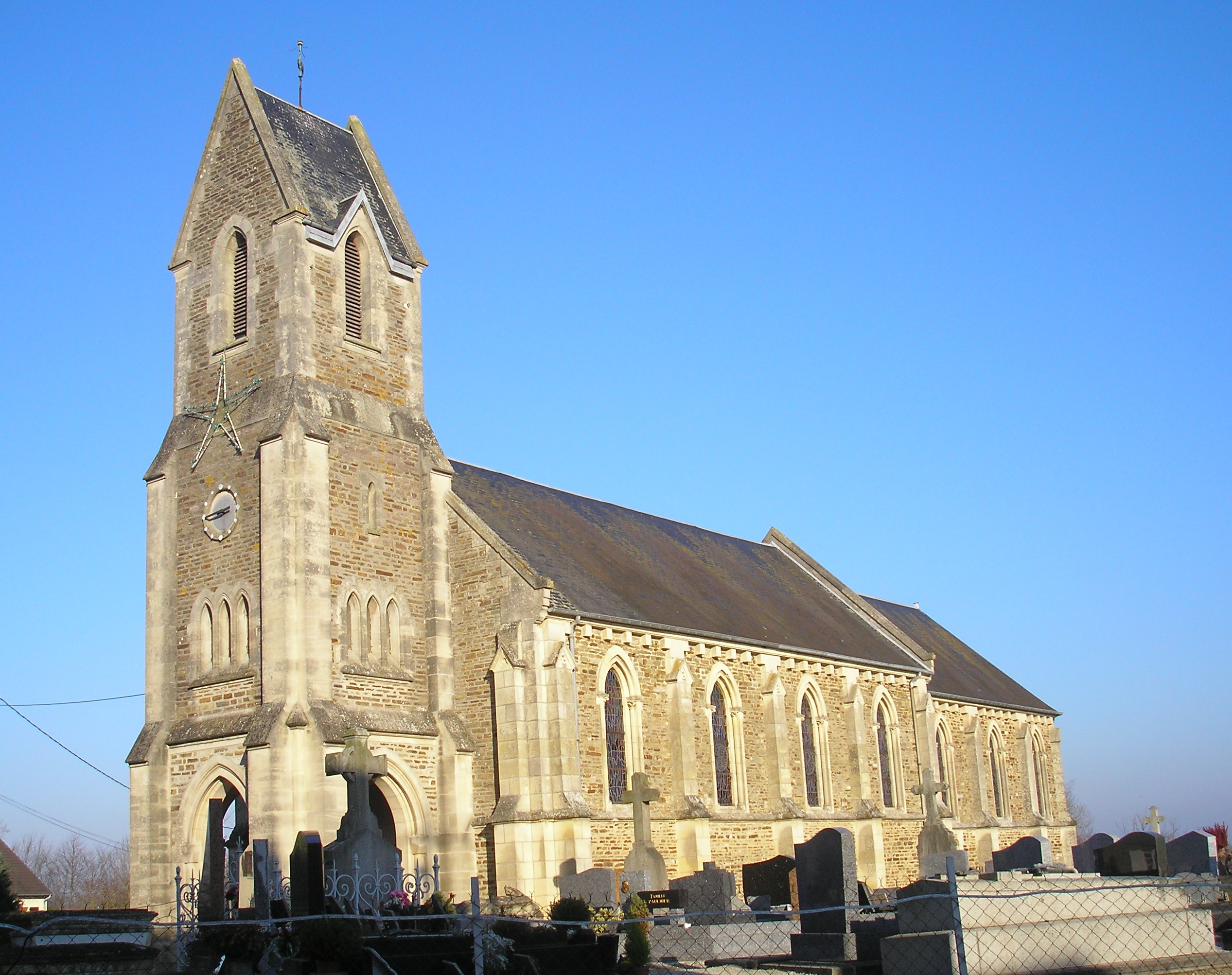 Sermentot (Normandie, France). L'église Saint-Aubin.